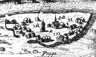 Fragment planu Erica Dahlbergha